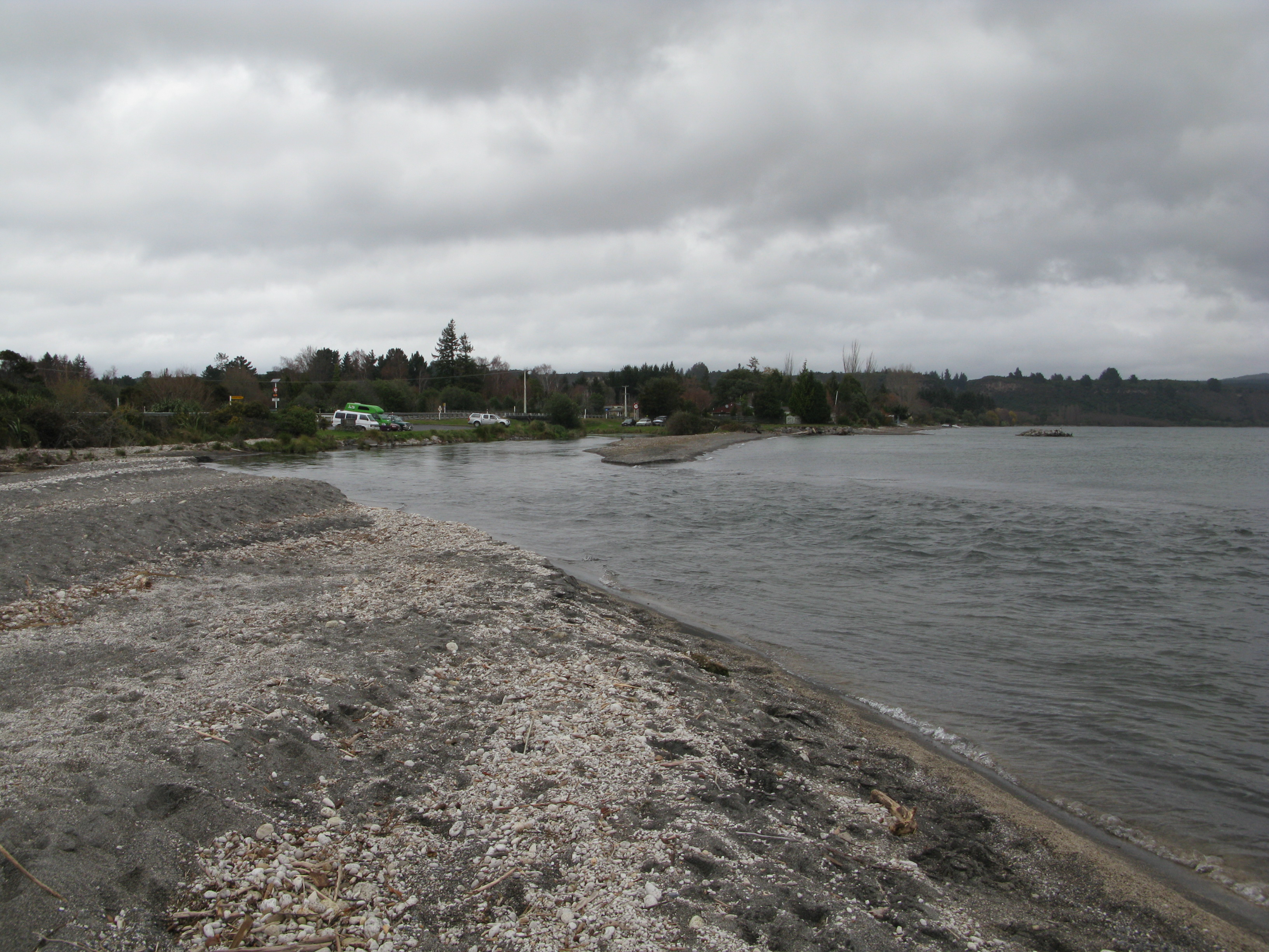 Entrée de la rivière Waitahanui.